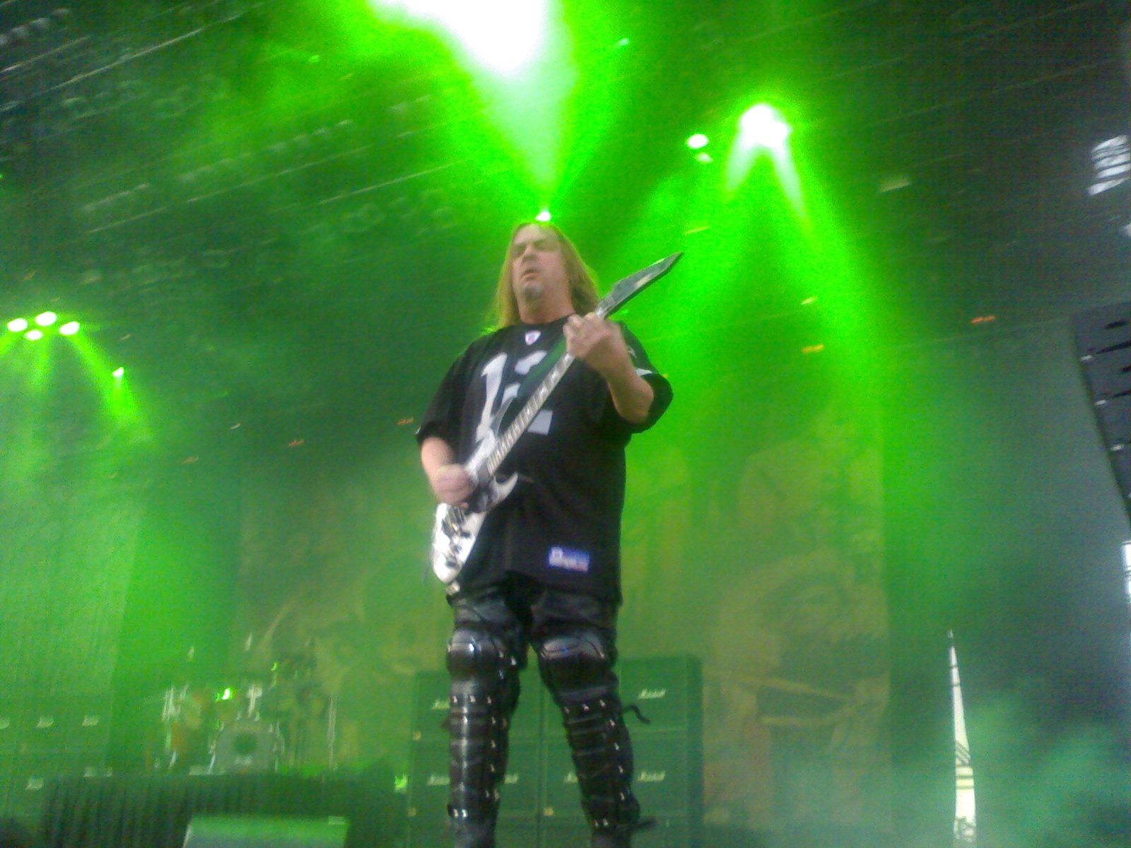 Jeff Hanneman, chitarrista degli Slayer